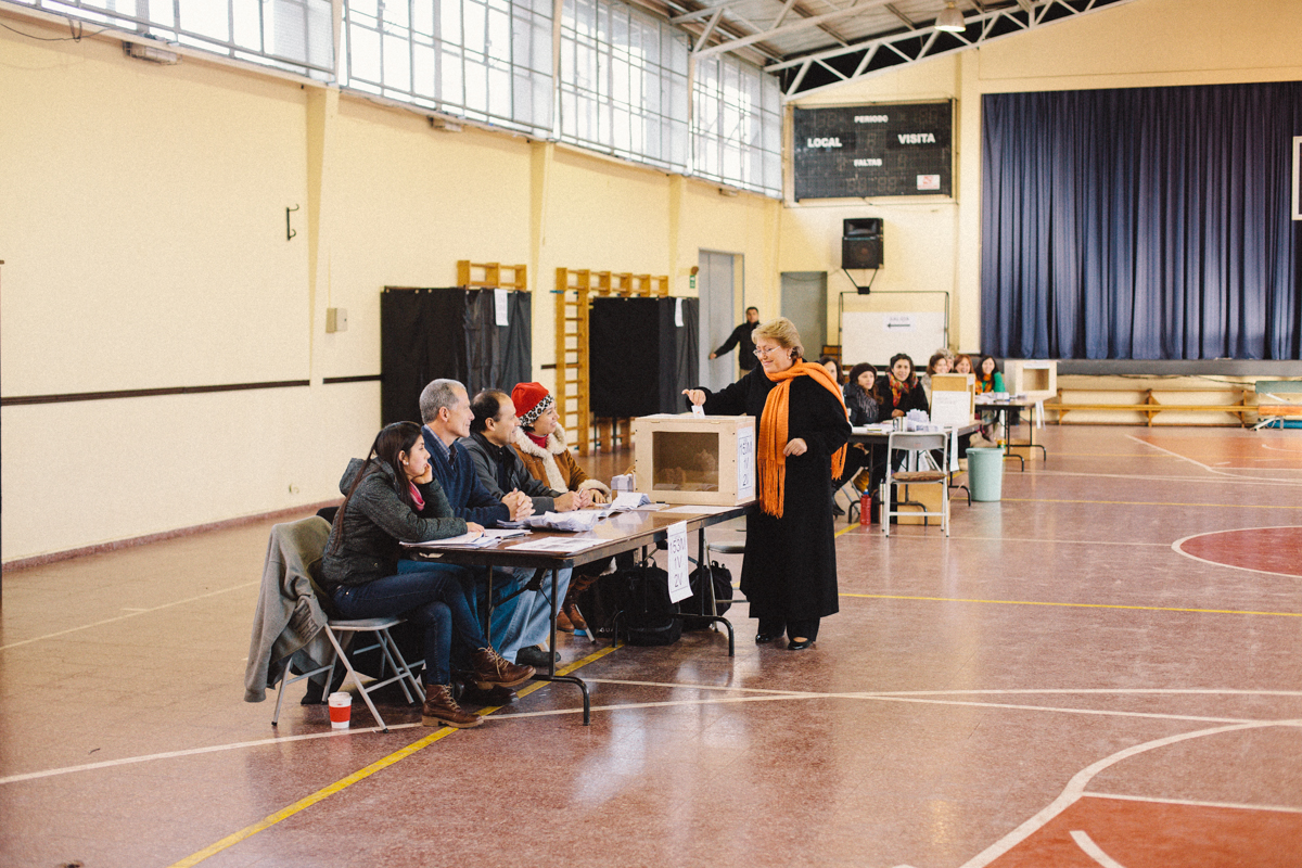 Michelle Bachelet vota en Colegio Teresiano Enrique De Ossó de La Reina en las primarias 2013.